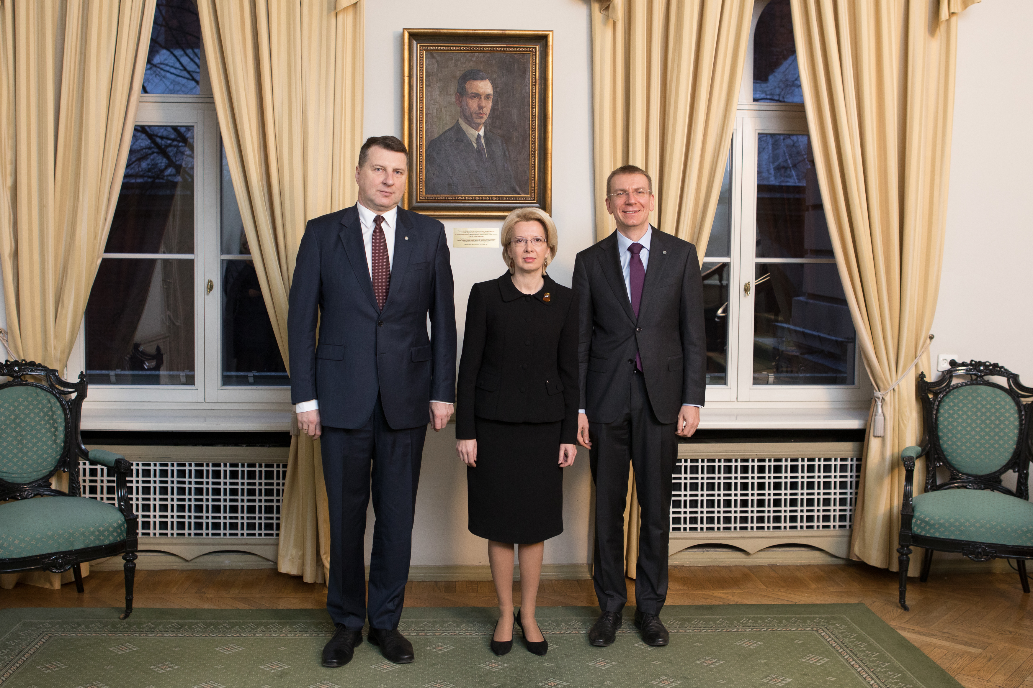 2017.gada 26.janvāris. Piemiņas brīdis pie Zigfrīda Annas Meierovica portreta Saeimas namā. Foto: Ernests Dinka, Saeimas Administrācija Izmantošanas noteikumi: saeima.lv/lv/autortiesibas